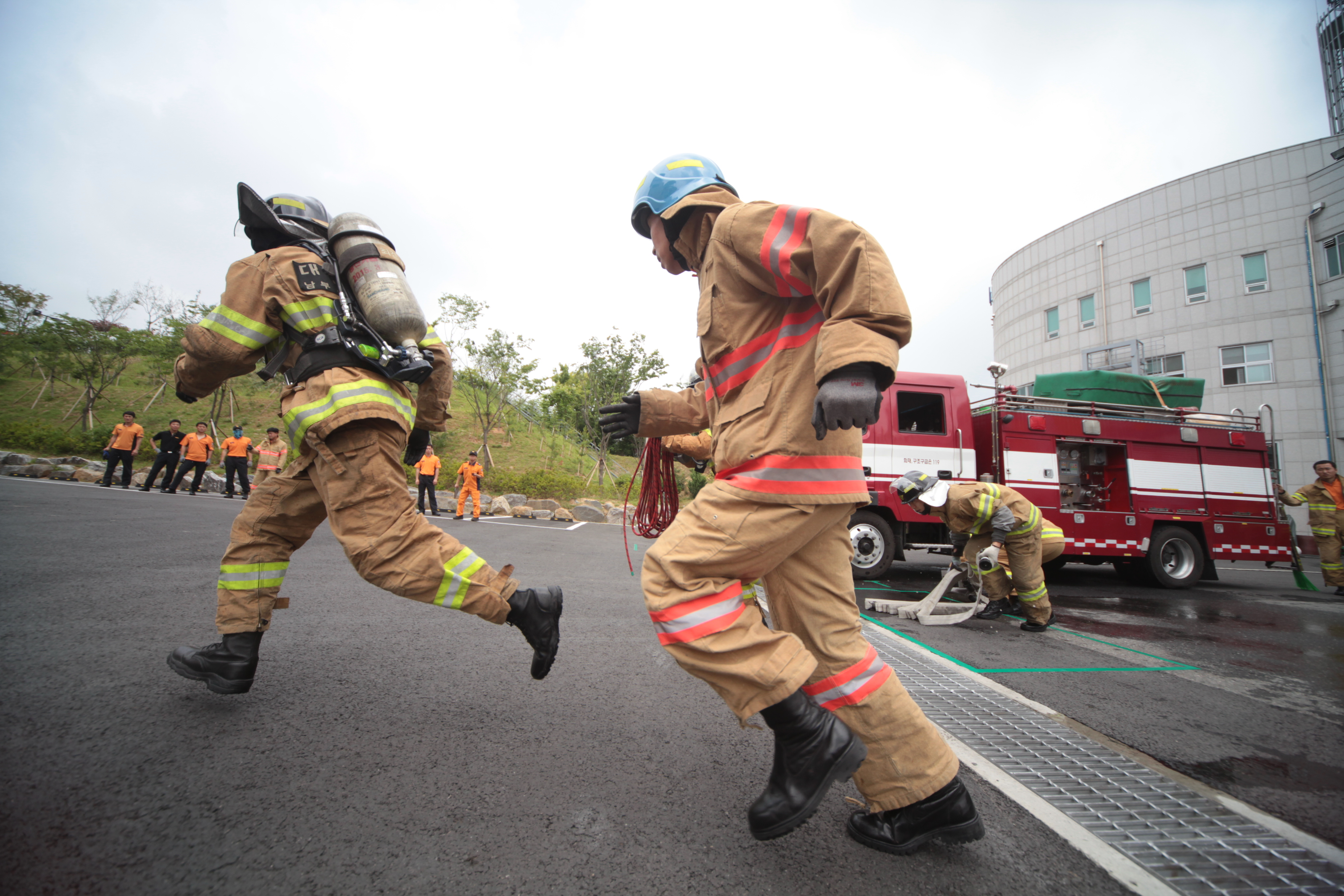 2014년 6월 10일 대전소방 소방기술경진대회